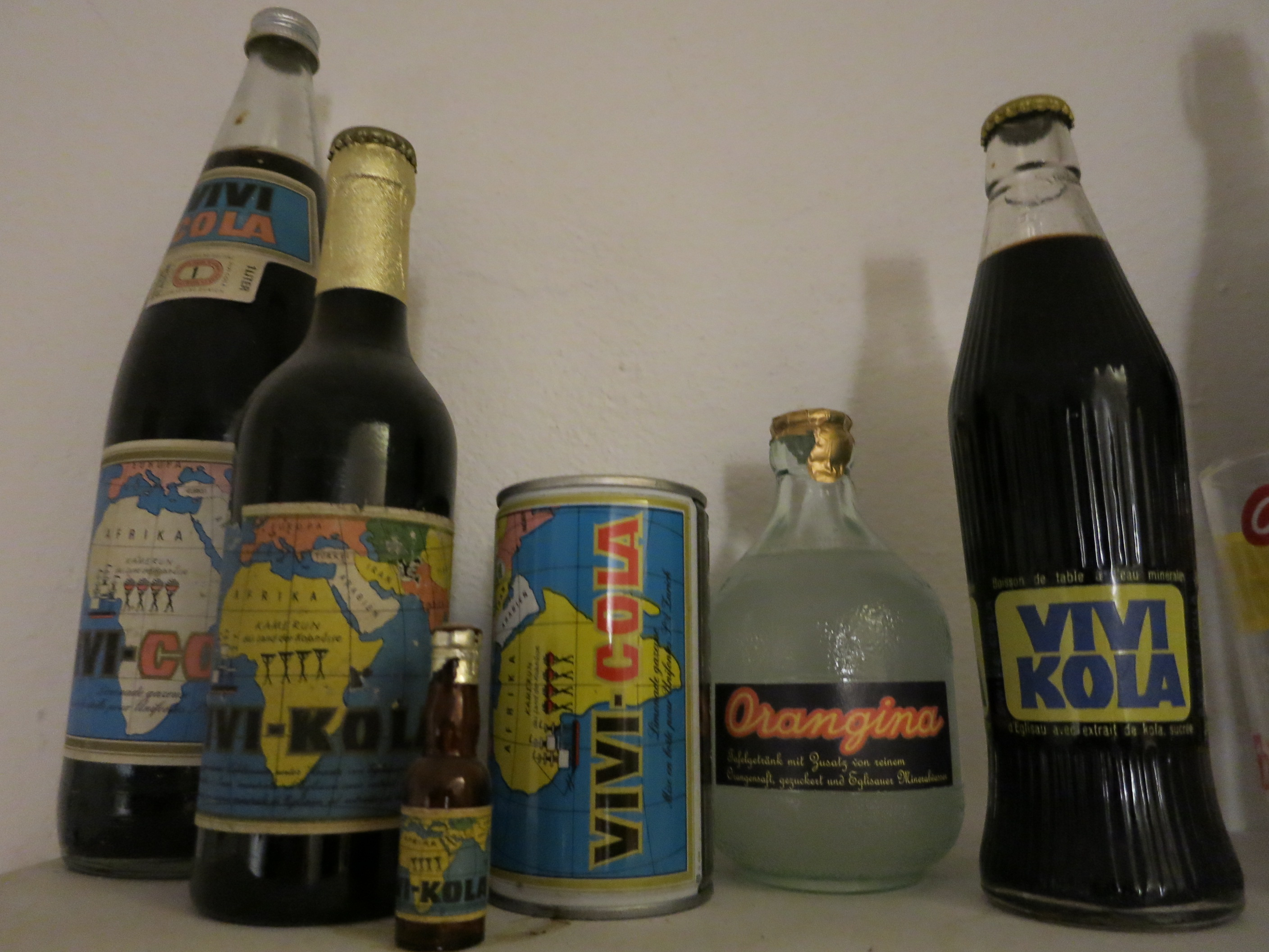 historische Vivi Kola Flaschen, Mineralwasser Eglisau ZH, Schweiz